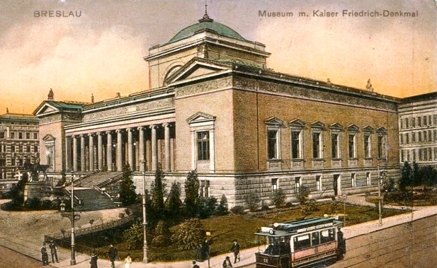 Breslau. Museum m. Kaiser-Friedrich-Denkmal, Ansichtskarte. Gebäude des Schlesischen Museums für bildende Künste in Breslau (1964 zerstört)